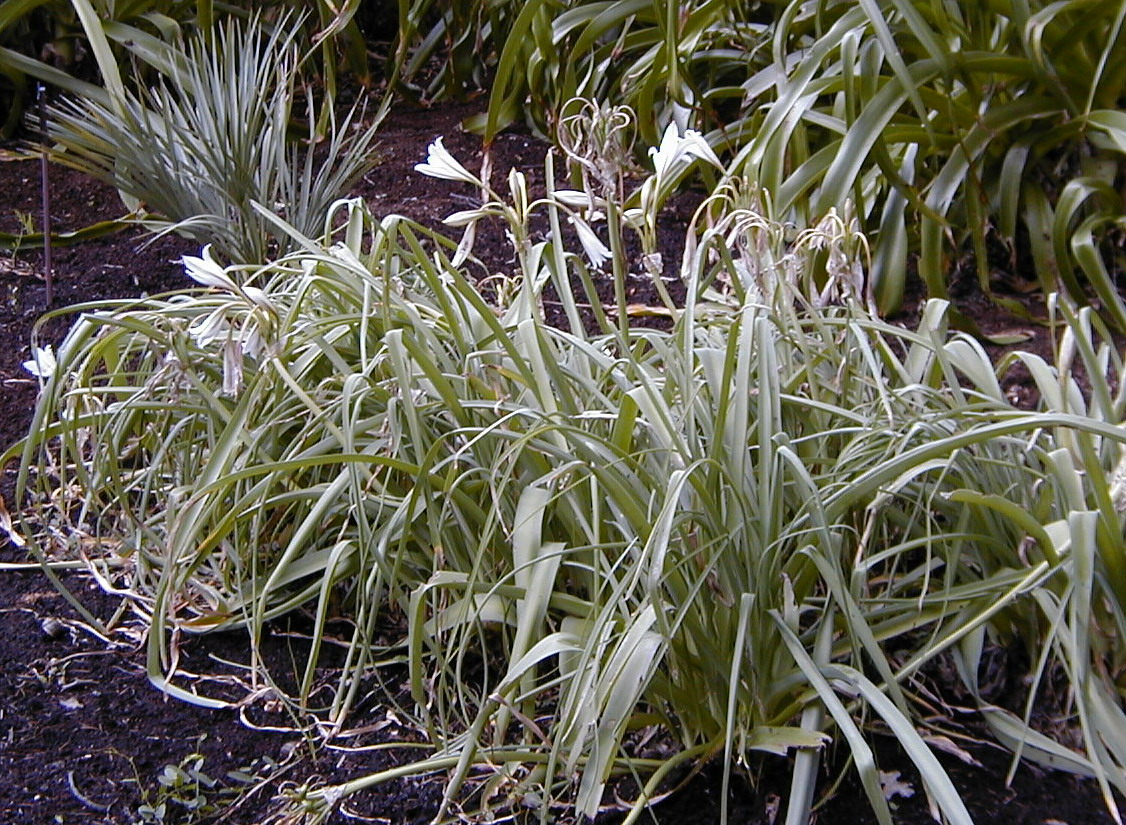 Crinum bulbispermum. Real Jardín Botánico de Madrid.